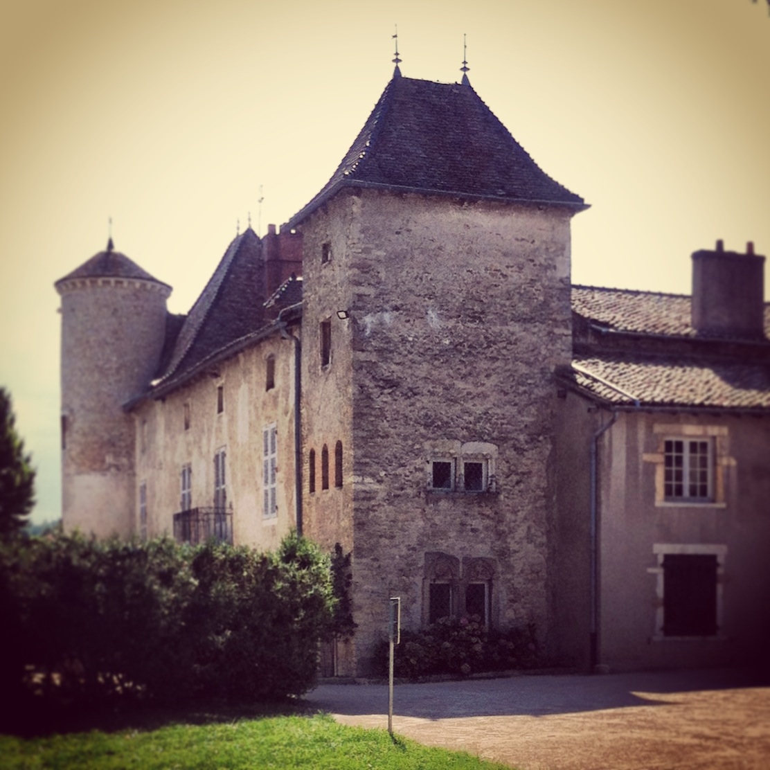 Suite aménagements 2012-2013